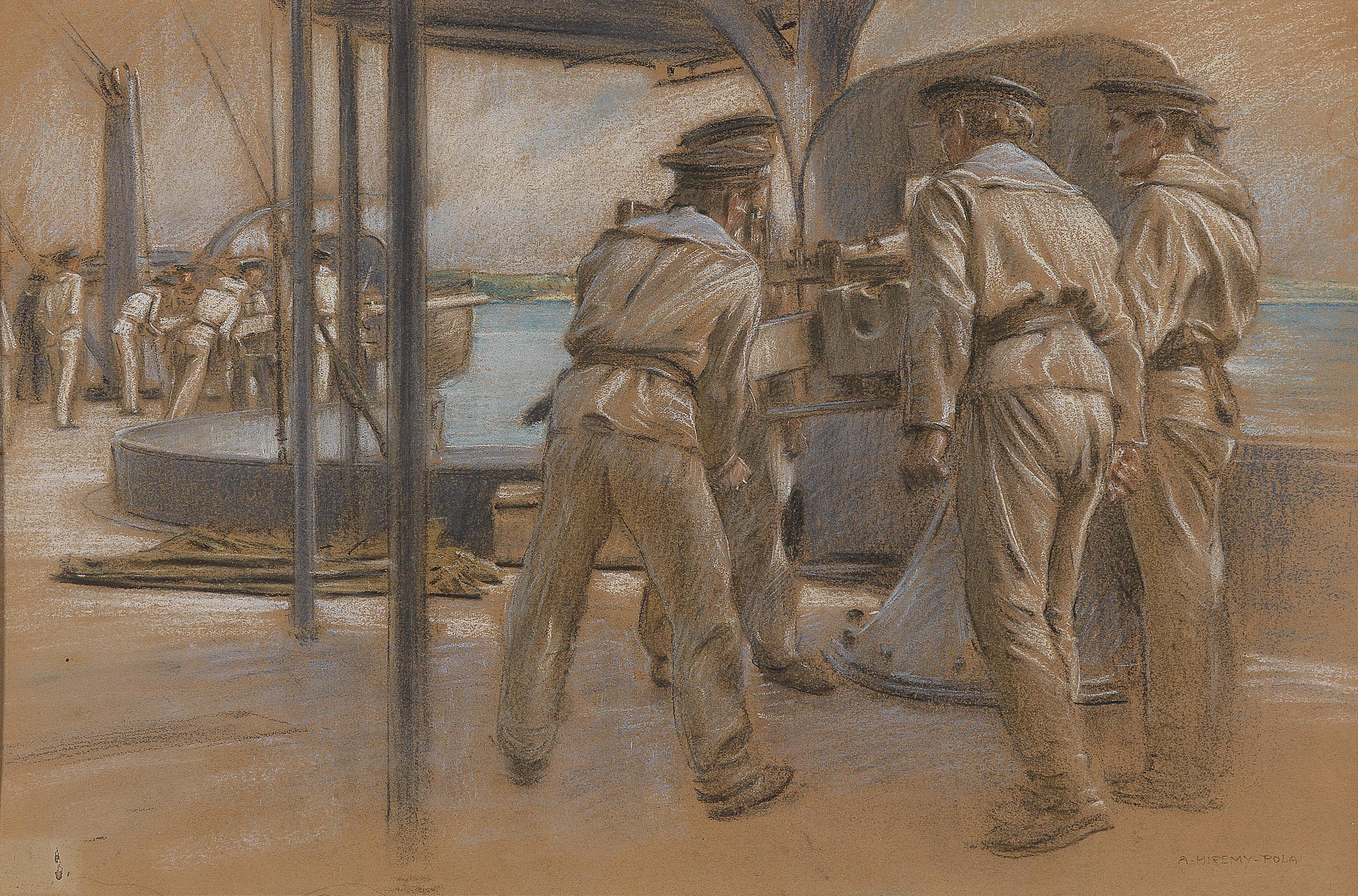 Matrosen am Hafen von Pola, signiert und mit Ortsangabe A. Hiremy-Pola, Pastell auf Papier, ca. 30 x 44 cm